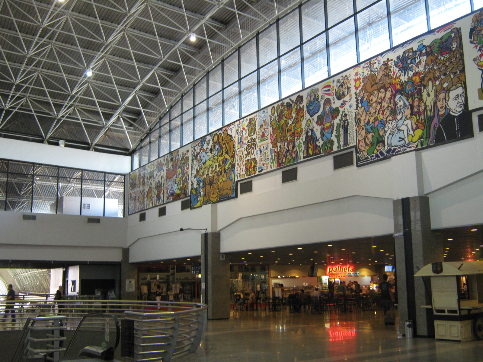 Brazil